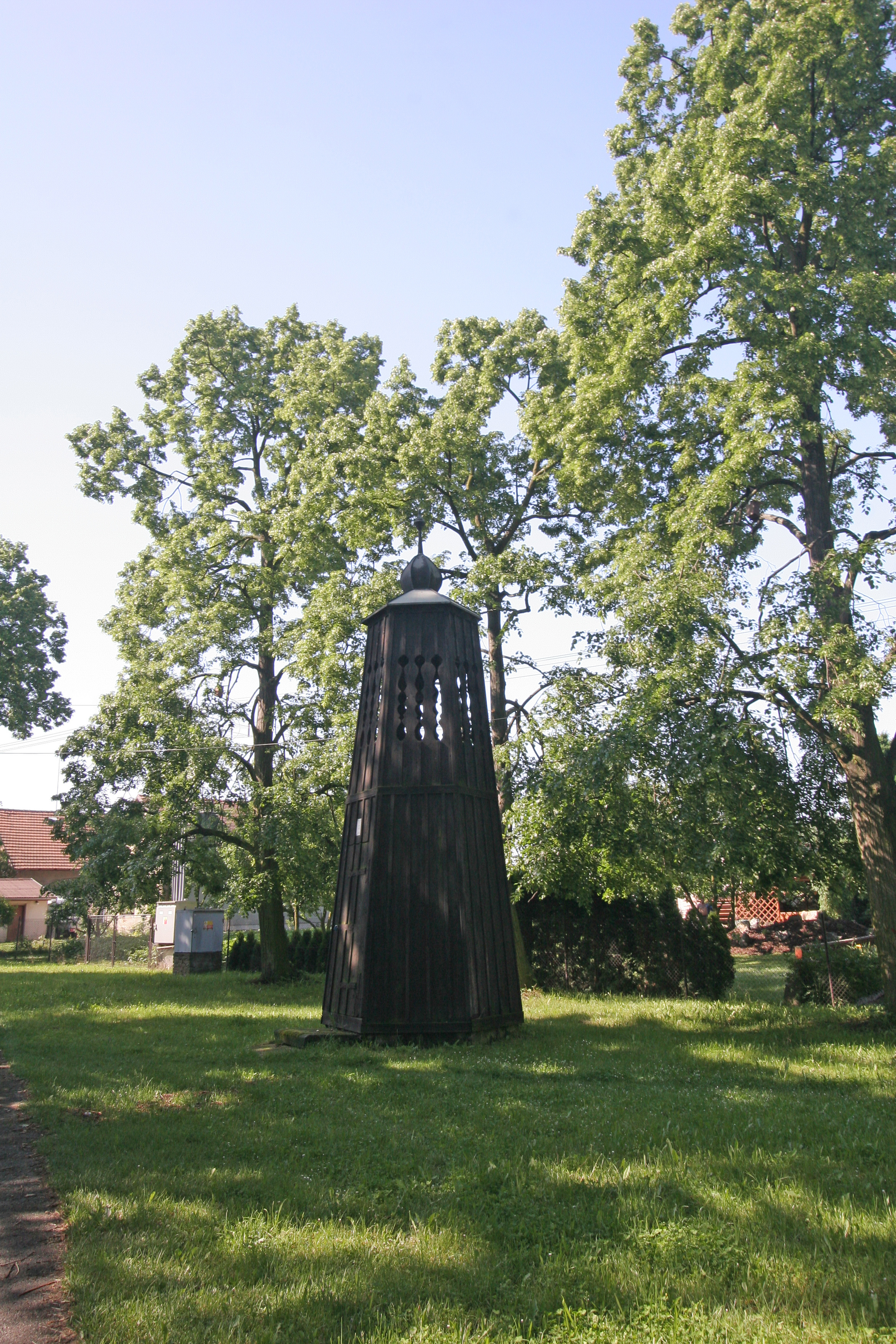 Zvonice s křížem (Starý Mateřov), náves, Starý Mateřov